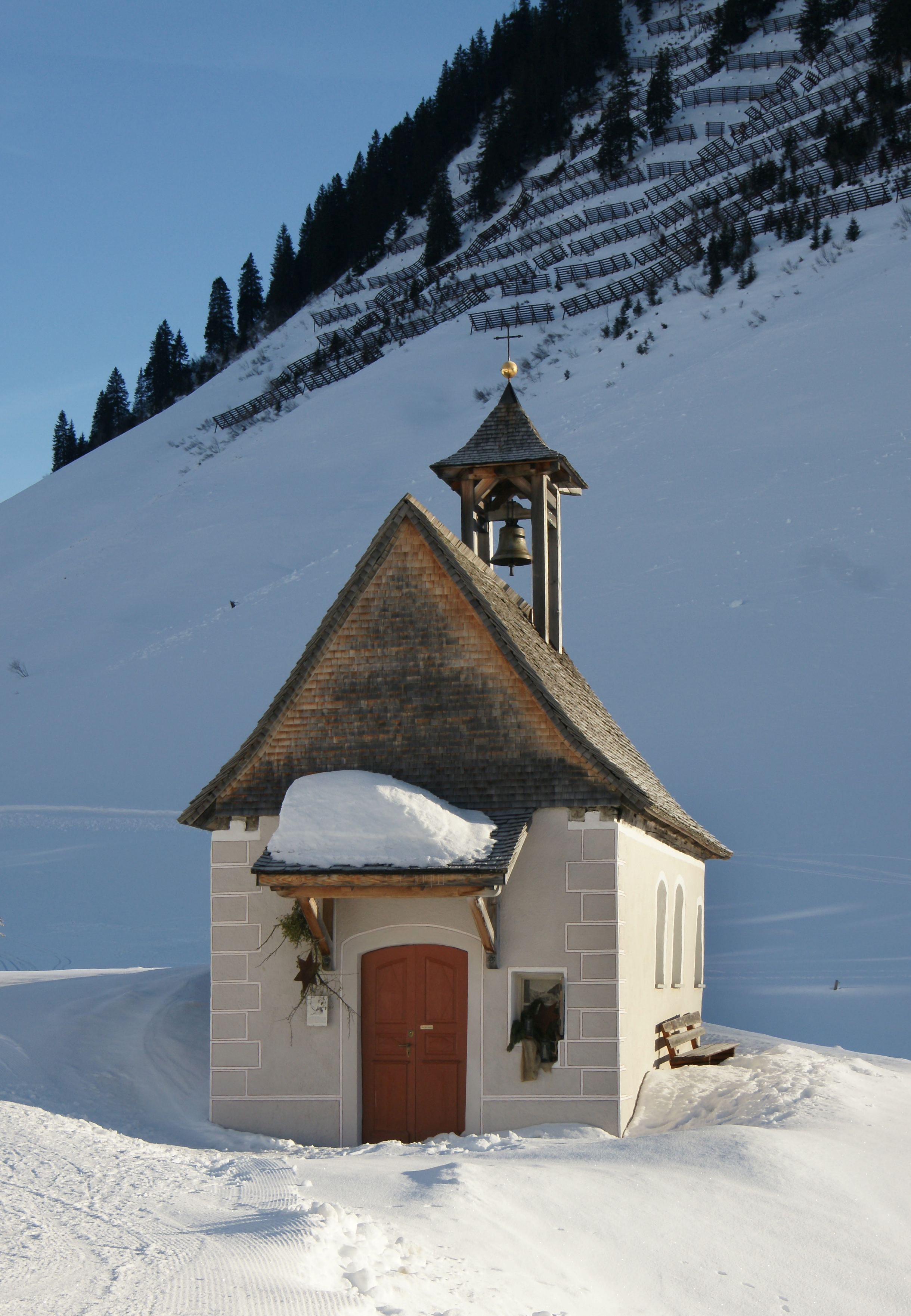 Kapelle Hl. Anna in Fontanella - Faschina. Der Steilhang im Hintergrund gehört zum Sonnenköpfle. aus dem DEHIO Vorarlberg 1983: Um 1700 als Stiftung von Dr. Josef Hartmann (später 1717-1720 Bürgermeister von Wien) erbaut. 1951/52 Restauriert. Rechteckbau mit Rundapsis unter gemeinsamem Satteldach und Glockendachreiter im Osten. Im Westen Vorzeichen mit Pultdach auf 2 Stützen, beschindelte Westgiebelfassade. Flachgedeckter Betraum mit Holzfelderdecke, eingezogener rundbogiger Chorbogen, Chorraum mit Wölbung. Barocker Altaraufbau um 1700, Altarbild hl. Anna mit Maria, Erstes 19. Jh., Figuren Hll. Maria mit Kind, Nikolaus, Andreas deponiert. Über dem Chorbogen Akanthuskartusche mit Relief Gottvater um 1700.